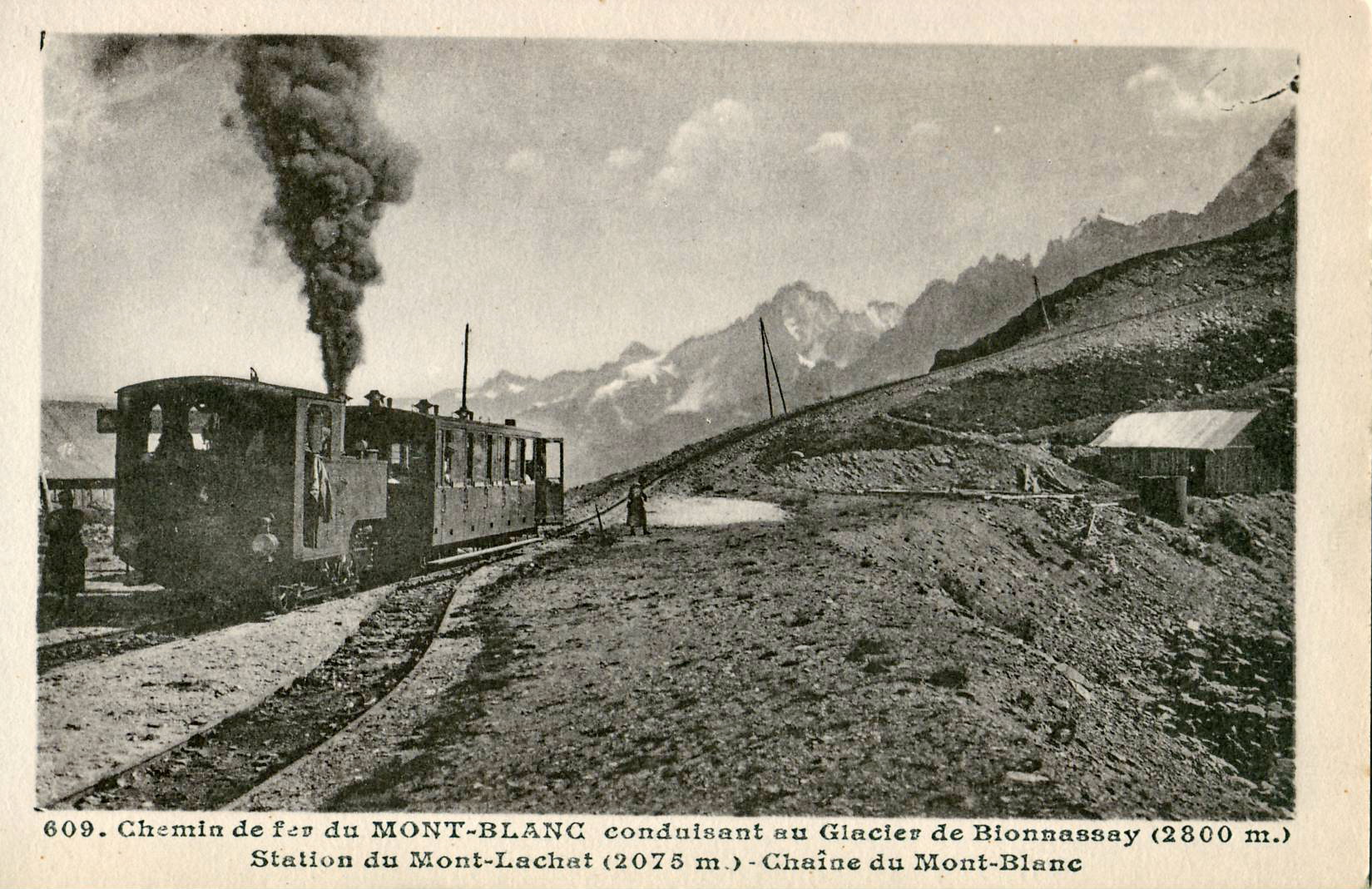 Carte postale ancienne éditée par Morand à Mégève, n°609 Chemin de fer du MONT-BLANC conduisant au Glacier de Bionnassay (2800 m.) - Station du Mont-Lachat (2075 m.) - Chaine du Mont-Blanc